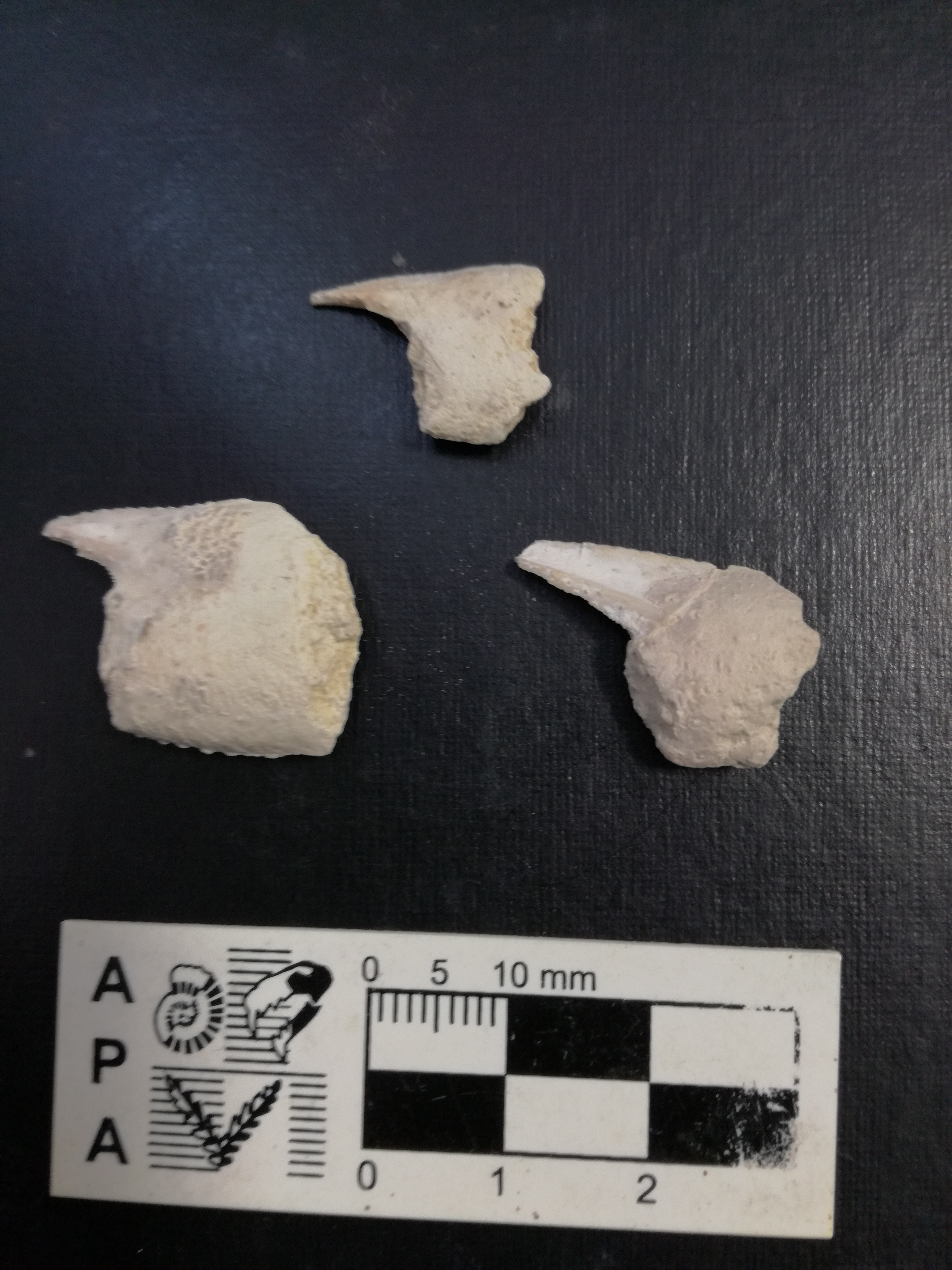 Pinzas encontradas en la Formacion Roca. Que pertencen a Callianasa sp.